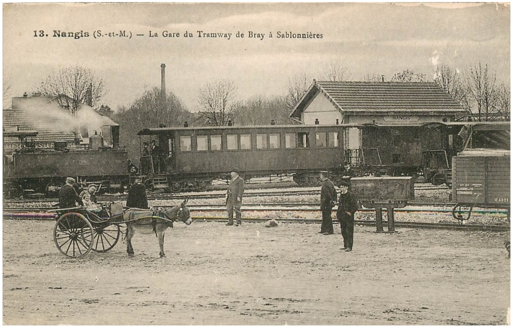 Gare tramway de Nangis au début du XXème siècle.